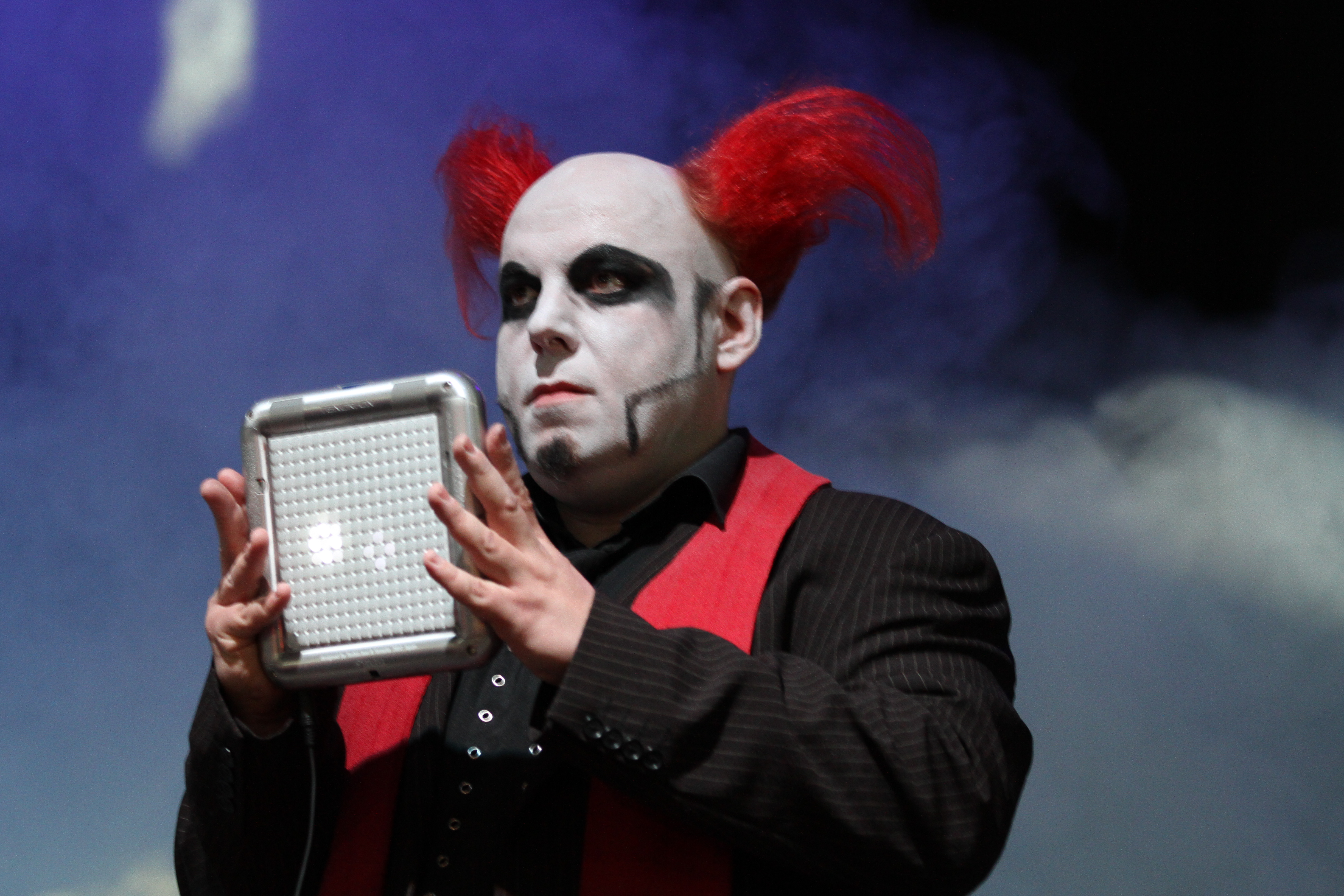 Bruno Kramm von Das Ich auf dem Wave-Gotik-Treffen 2013 in der Agra-Halle.